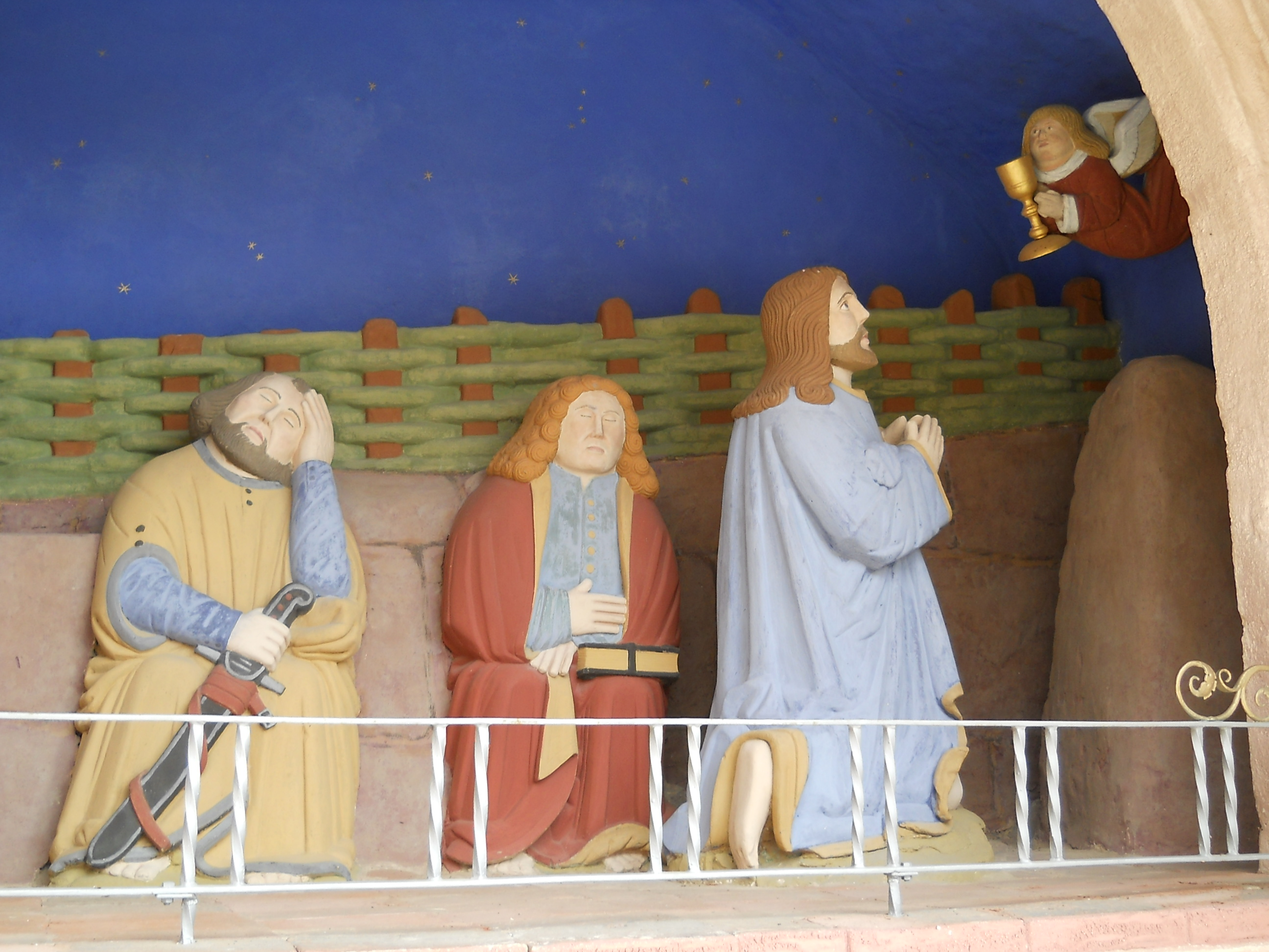 Rauenzell, Ortsteil von Herrieden im Landkreis Ansbach (Bayern), Kath. Pfarrkirche Mariä Heimsuchung, Ölberggruppe (Mitte 15. Jahrhundert)